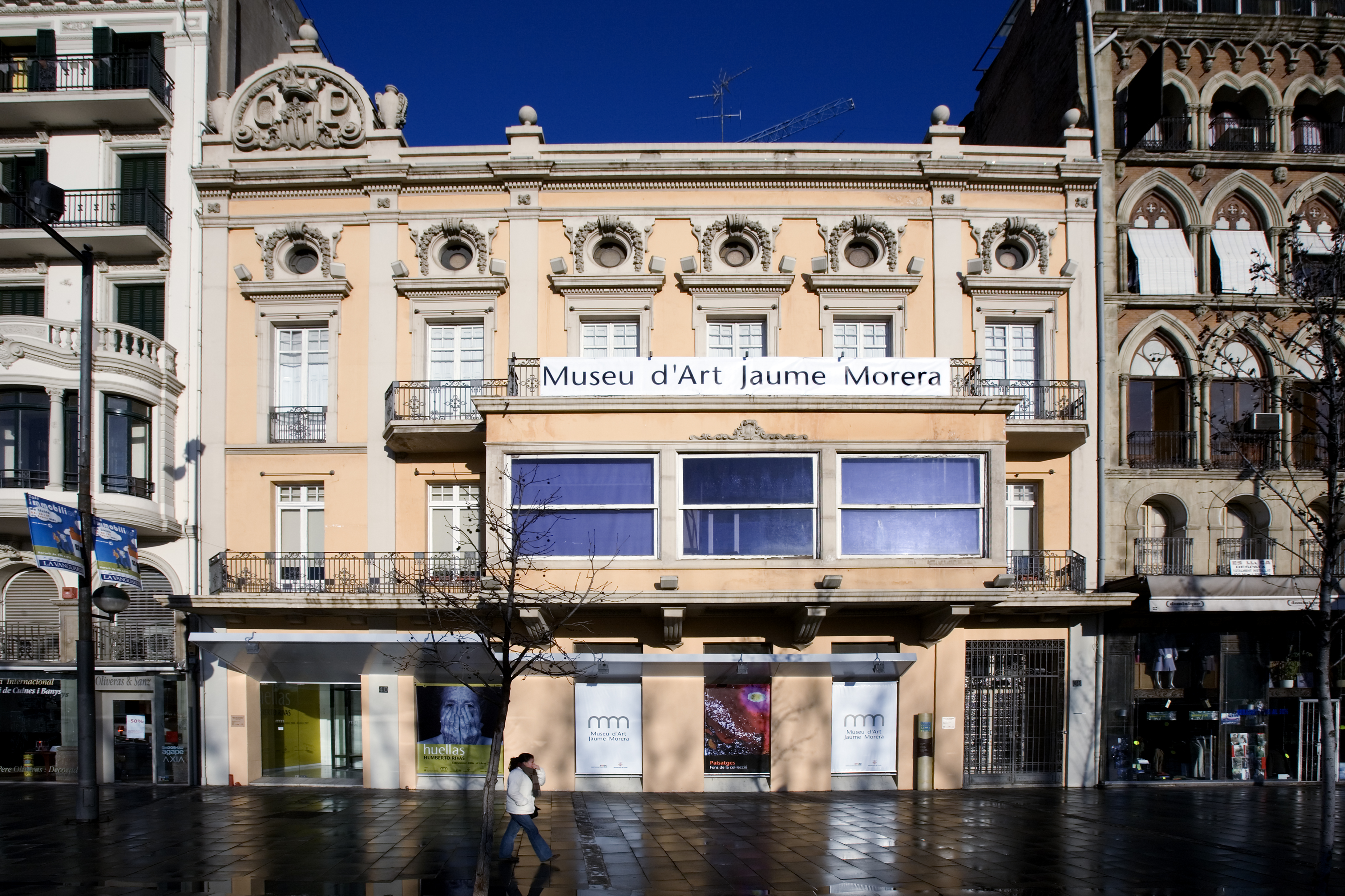 Façana del Casino Principal